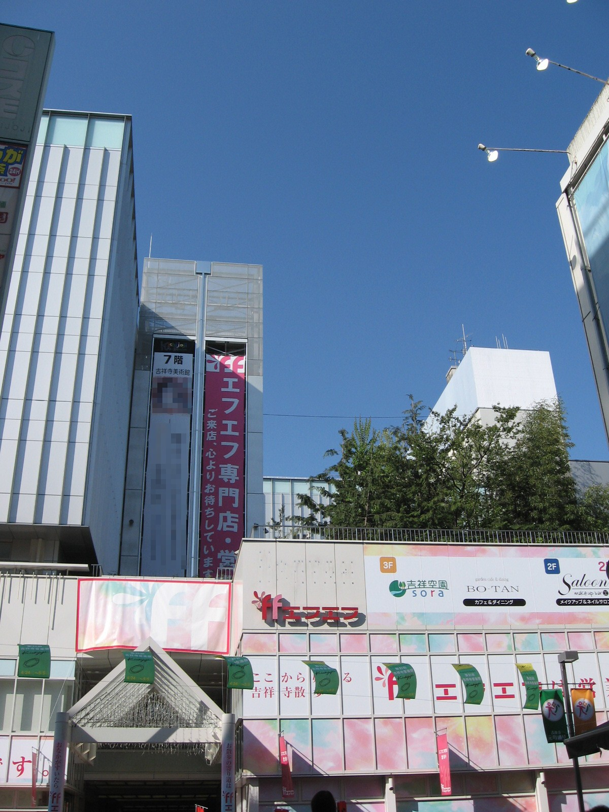 東京都武蔵野市吉祥寺のショッピングセンター「エフエフ」。かつて伊勢丹吉祥寺店があったが、2010年3月14日に同店が閉店した後も「エフエフ」は営業を継続。同年10月には「コピス吉祥寺」開業に伴い「コピスエフエフ」と改称。